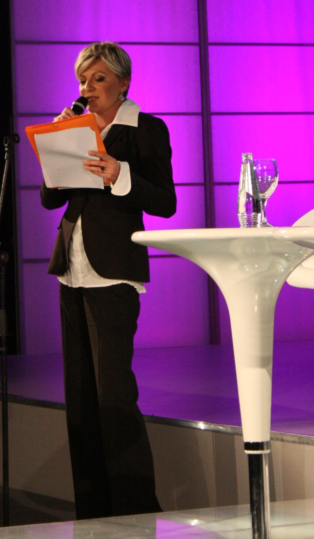 Željka Ogresta kao voditeljica T-HT-ove konferencije u Zagrebu